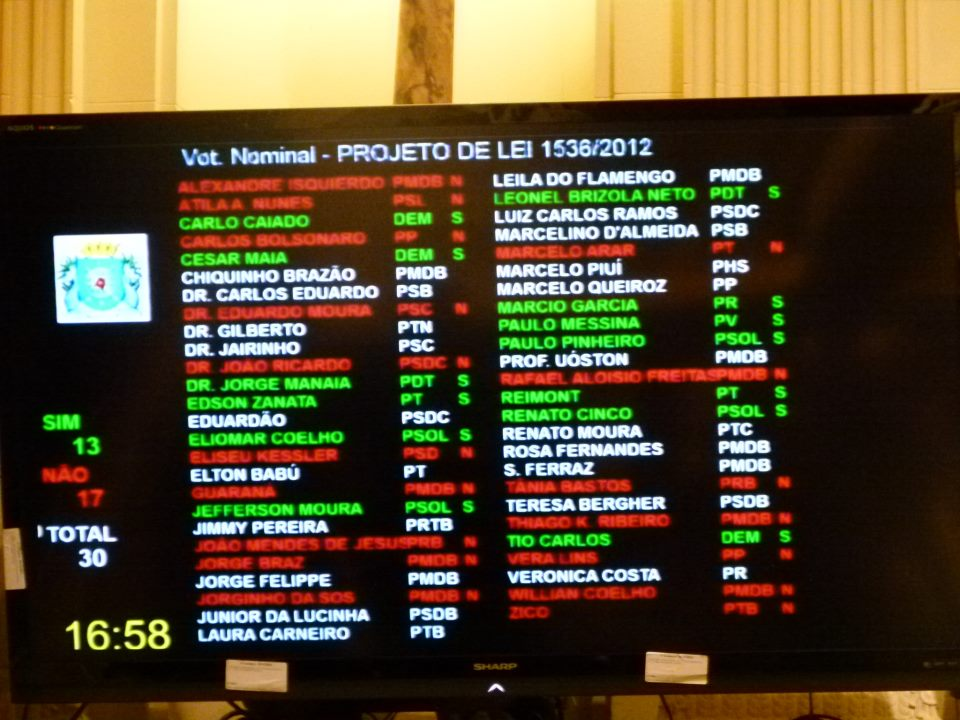 Painel de votação da Câmara dos Vereadores do Rio de Janeiro.